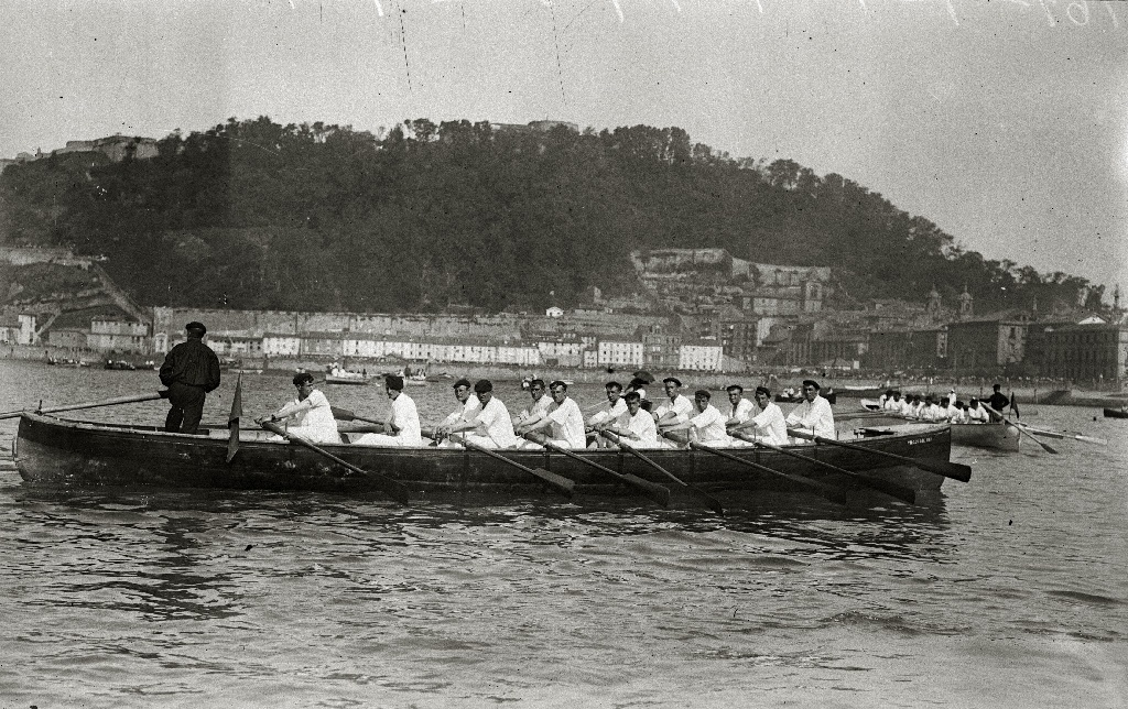 Título original: Regatas de traineras. Bandera de la Concha (2/2) Localización: San Sebastián (Guipúzcoa)